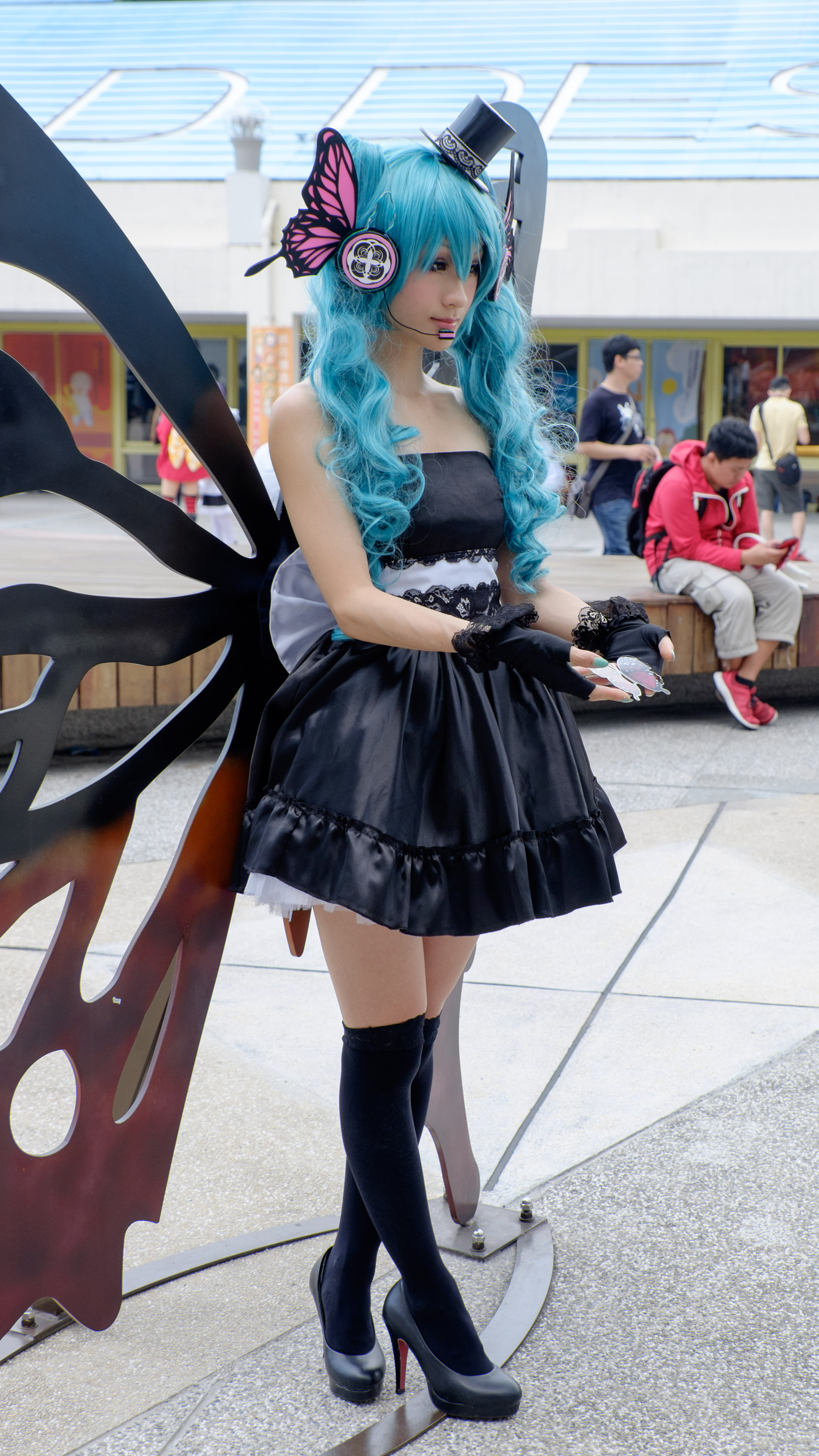 第22屆亞洲動漫創作展，初音未來cosplayer。